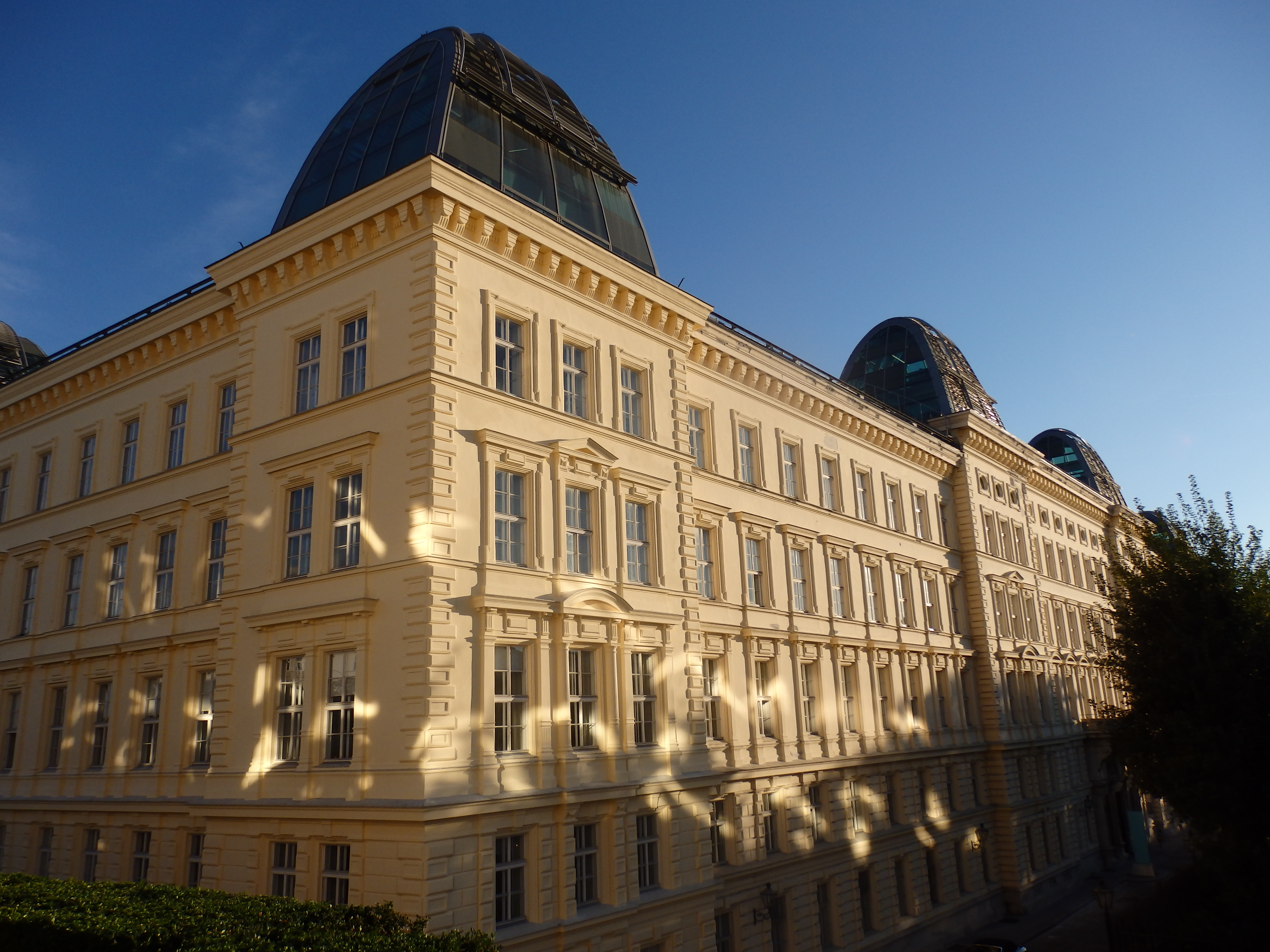 Hanuschhof (1862-63) von Anton Ölzelt, Goethegasse 1, Wien-Innere Stadt